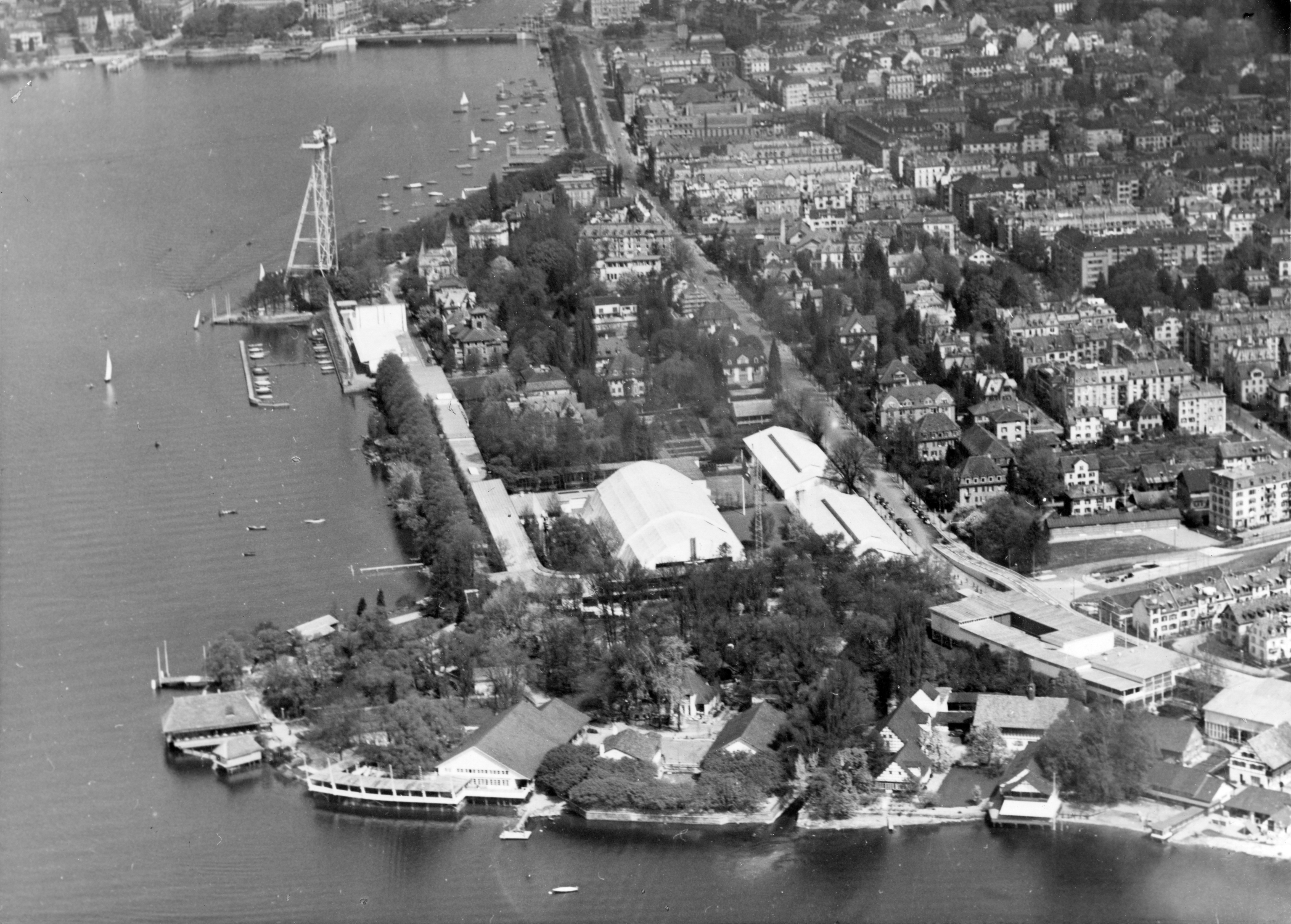 Landesausstellung 1939 in Zürich, Schweiz